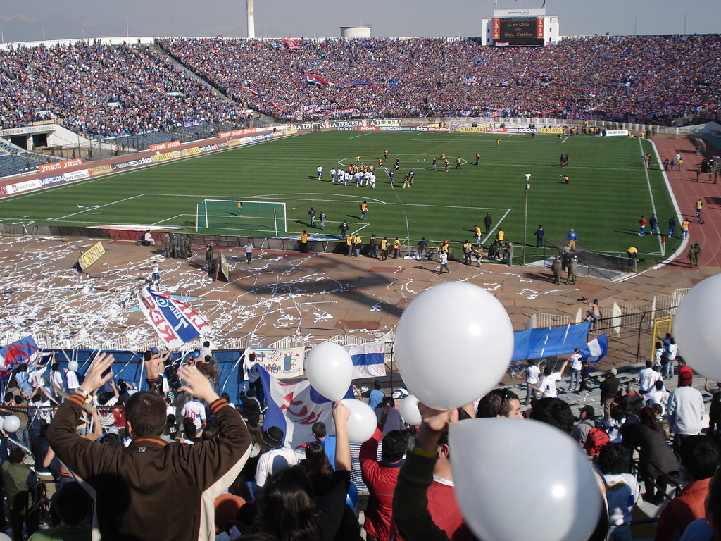 clasico universitarioclasico universitario